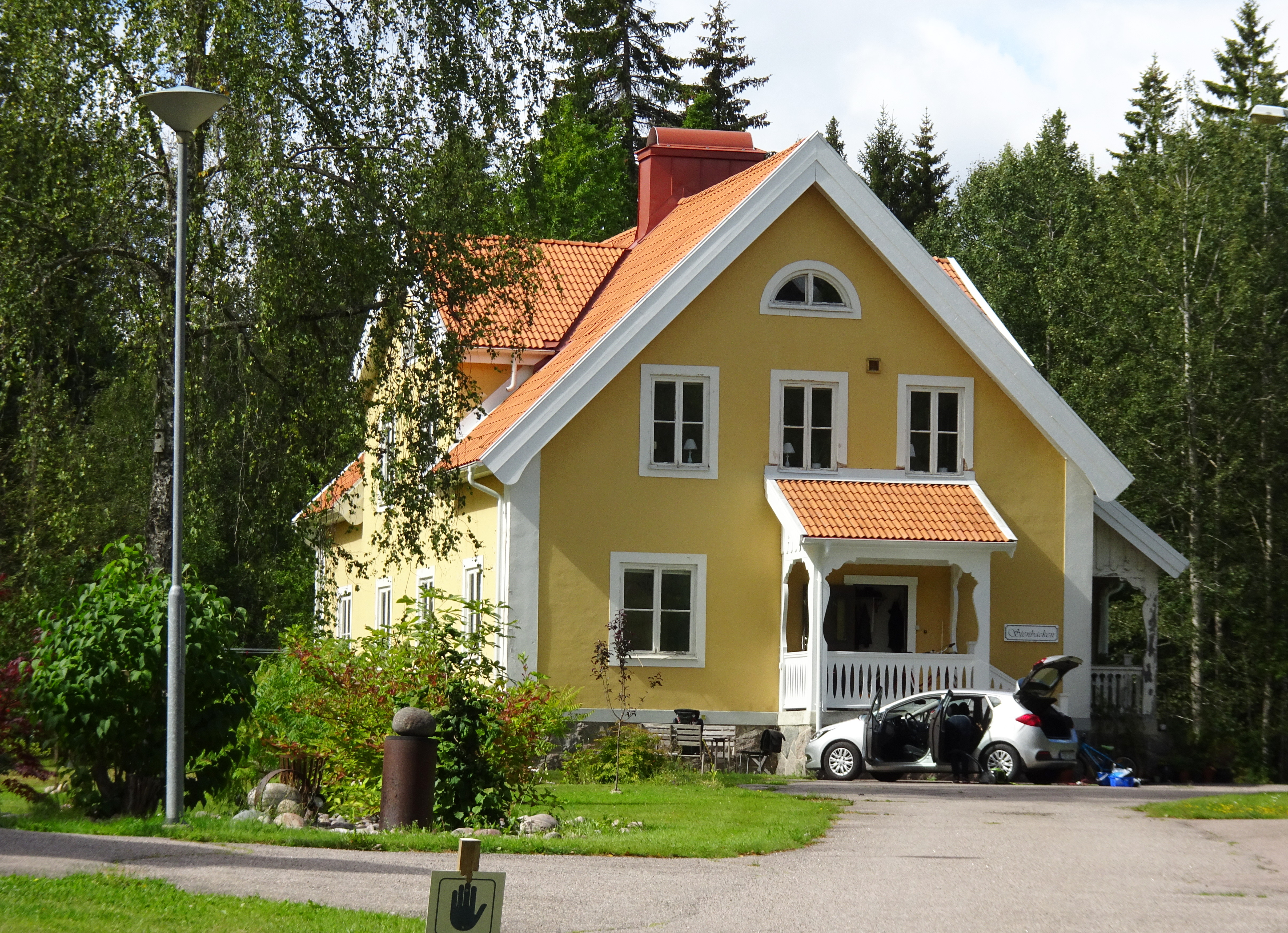 Untra kraftverk i Dalälven